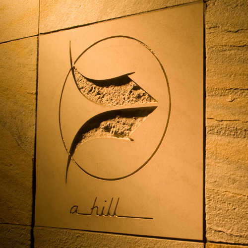 ahillのロゴ